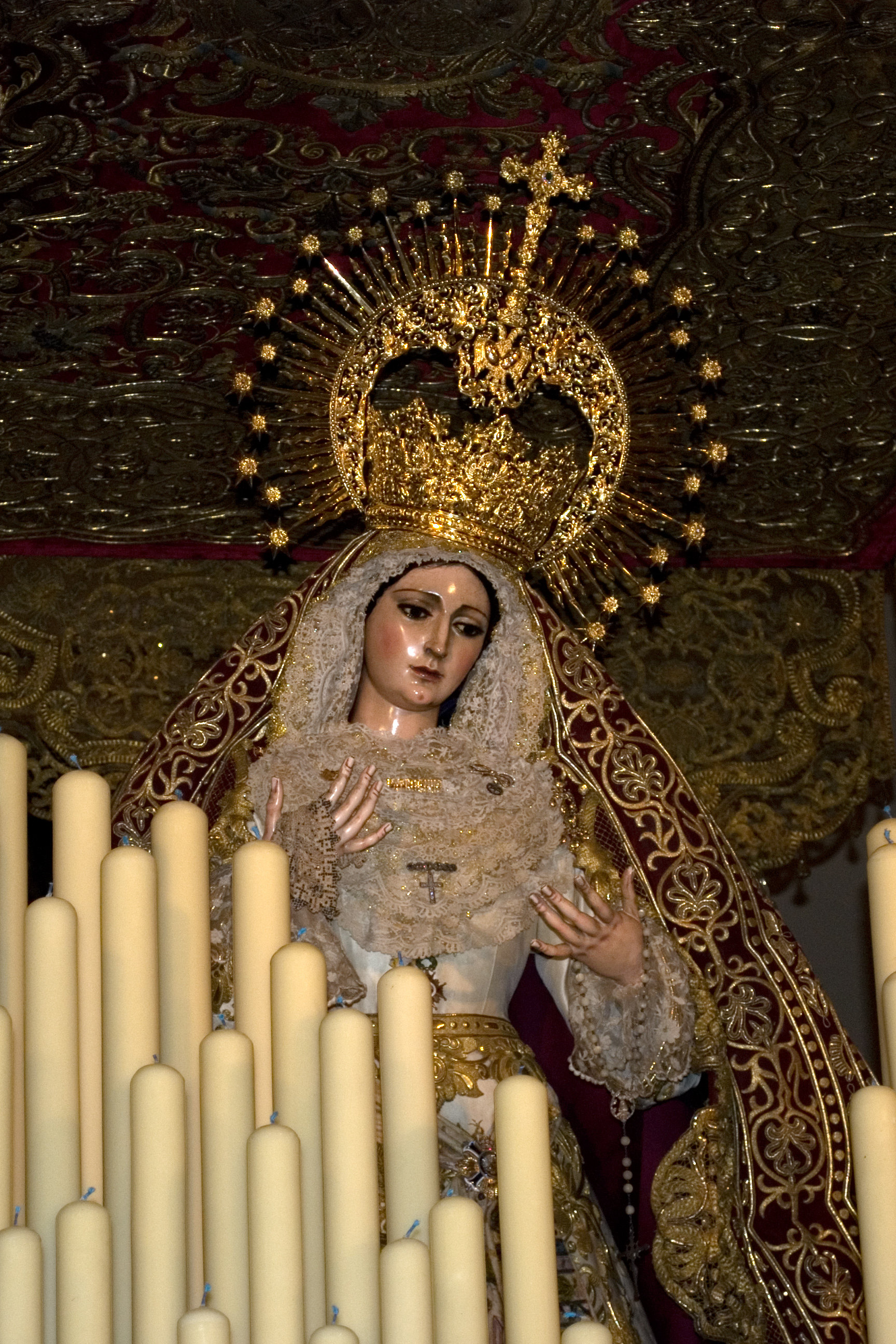 Virgen de patrocinio 001